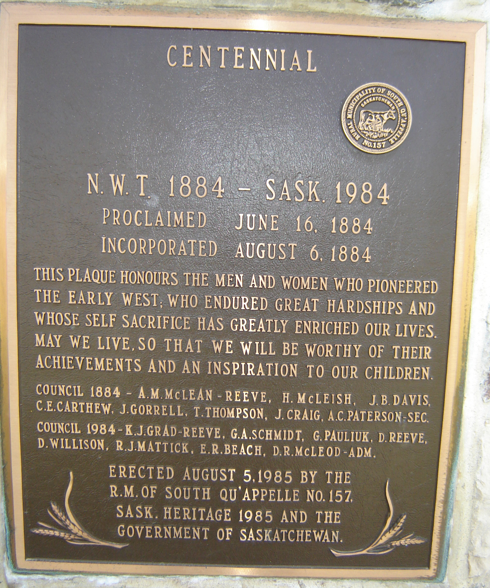 Plaque Qu'Appelle Saskatchewan